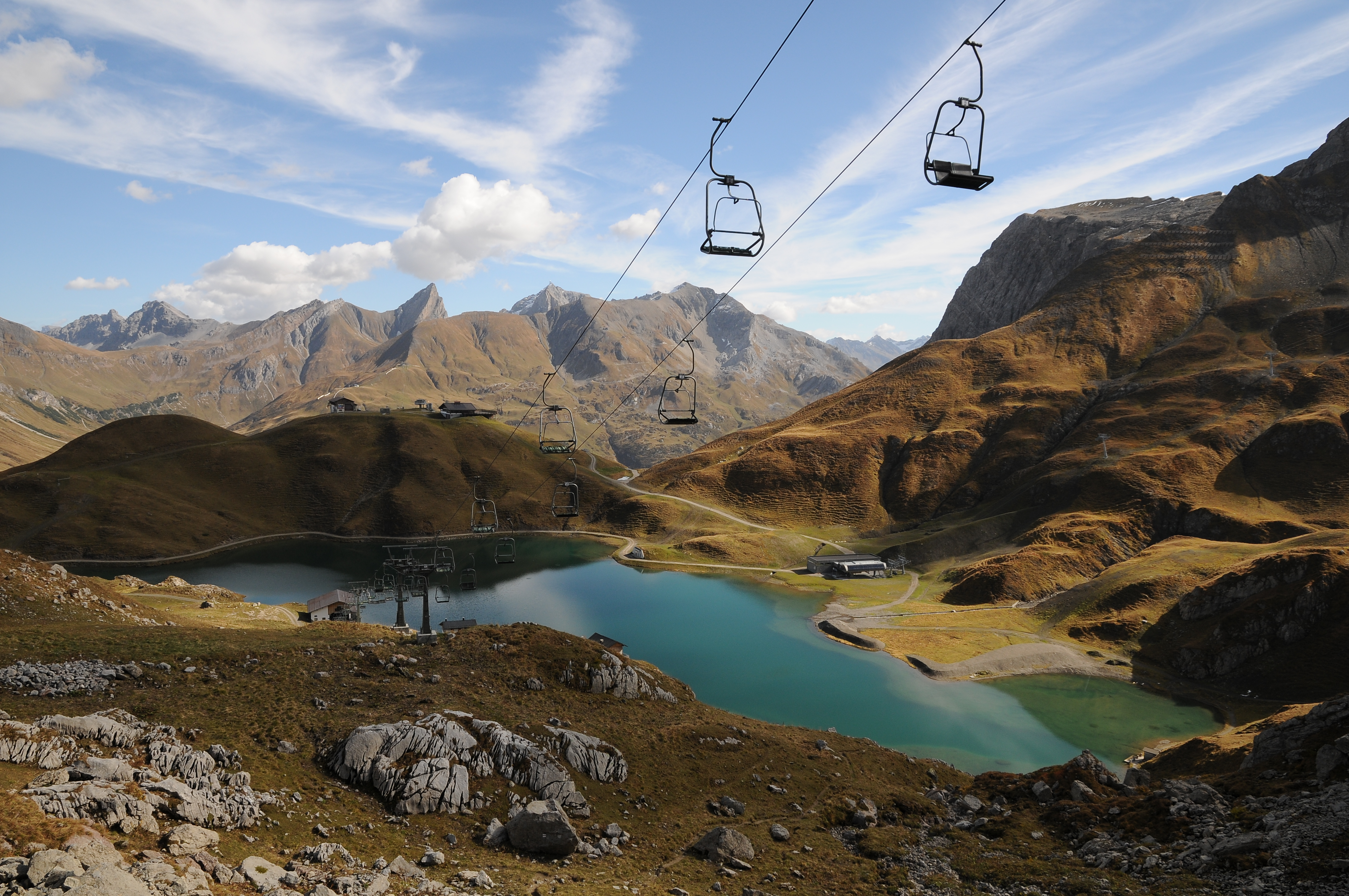 Der Zürsersee im Lechquellengebirge mit der Madlochbahn und rechts die Muggengratbahn. In der Bildmitte am Horizont links die Roggspitze 2.747m und rechts die Valluga 2.809m in den Lechtaler Alpen.